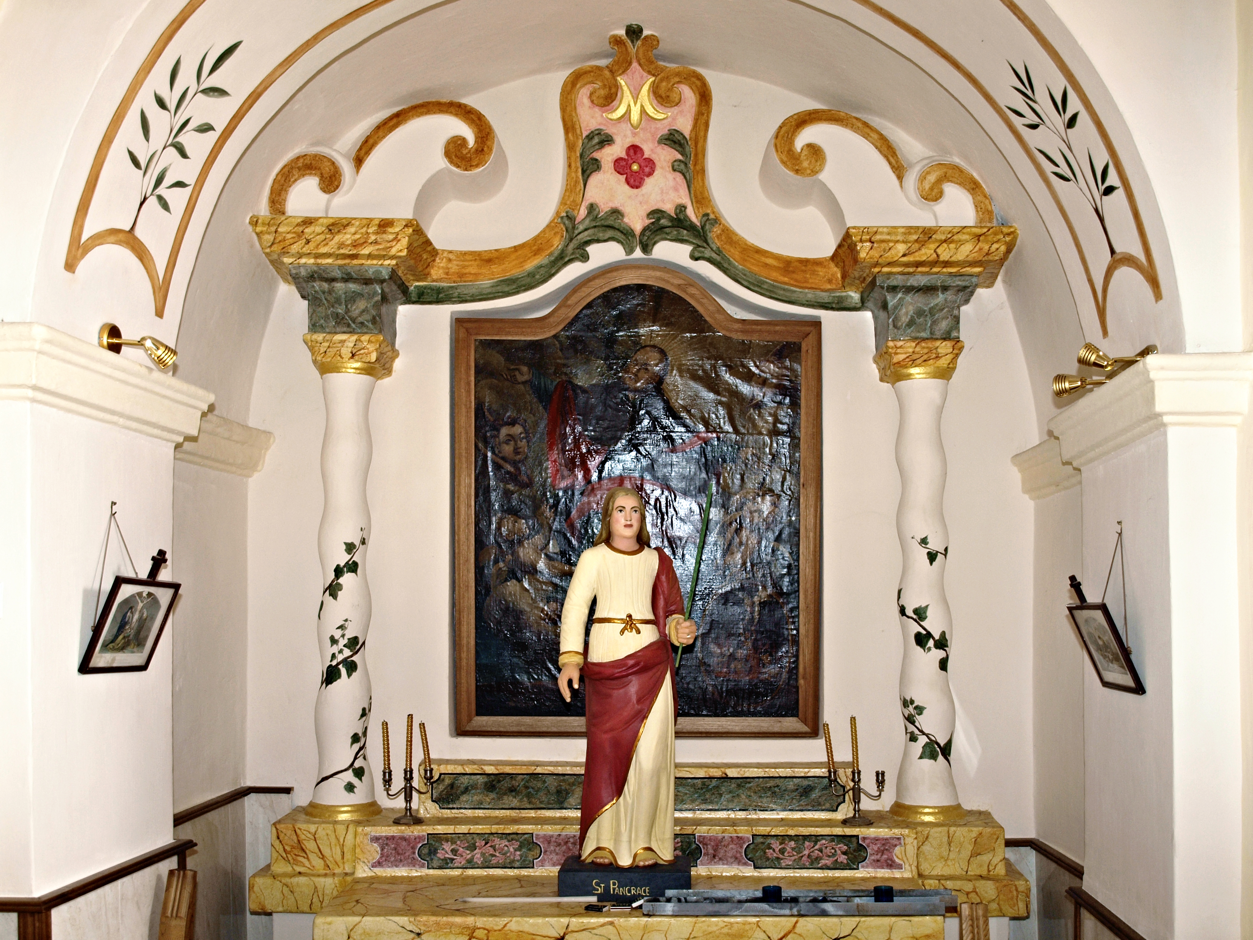 Popolasca (Corsica) - St-Pancrace, le saint patron